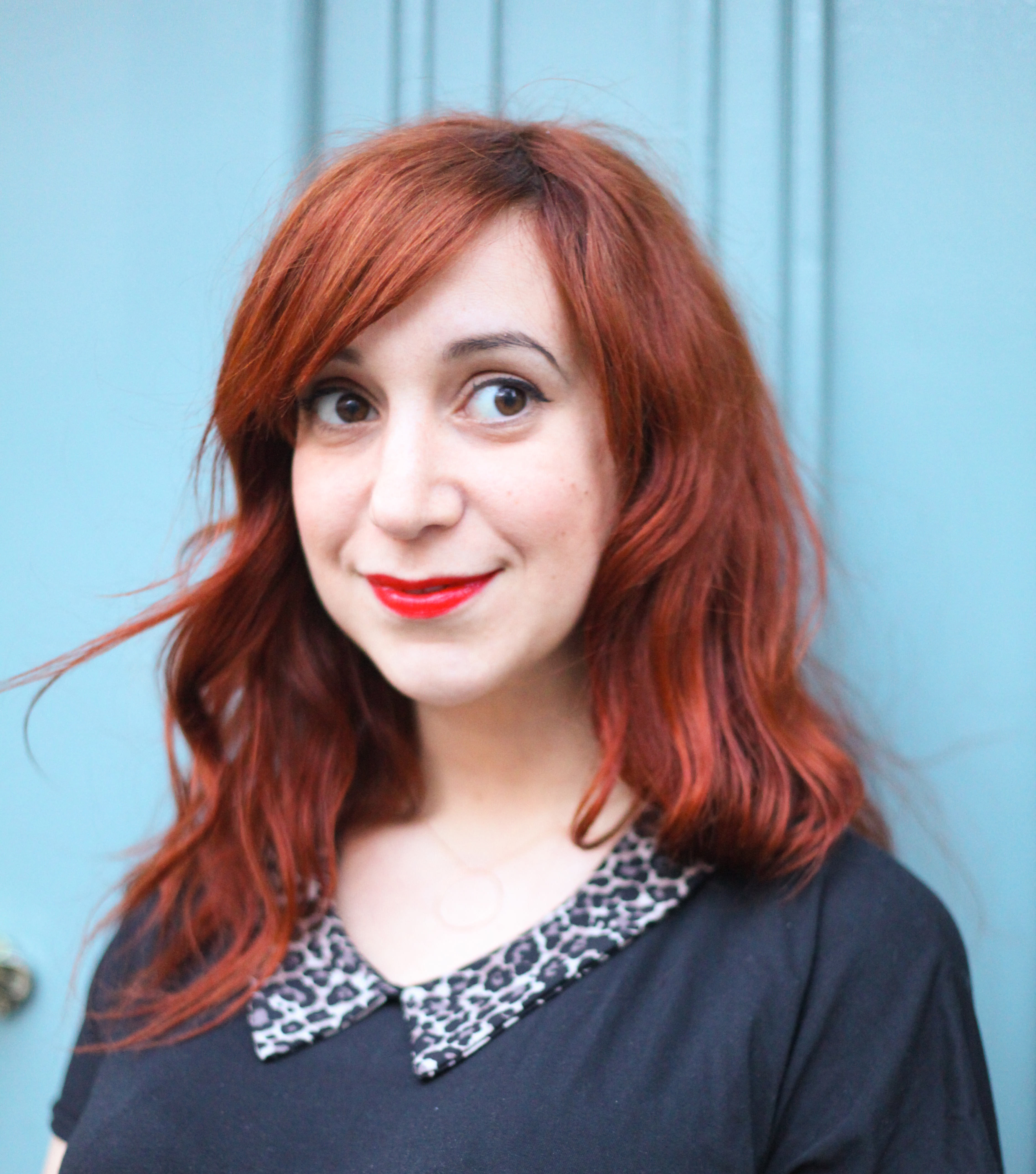 Portrait Pénélope Bagieu